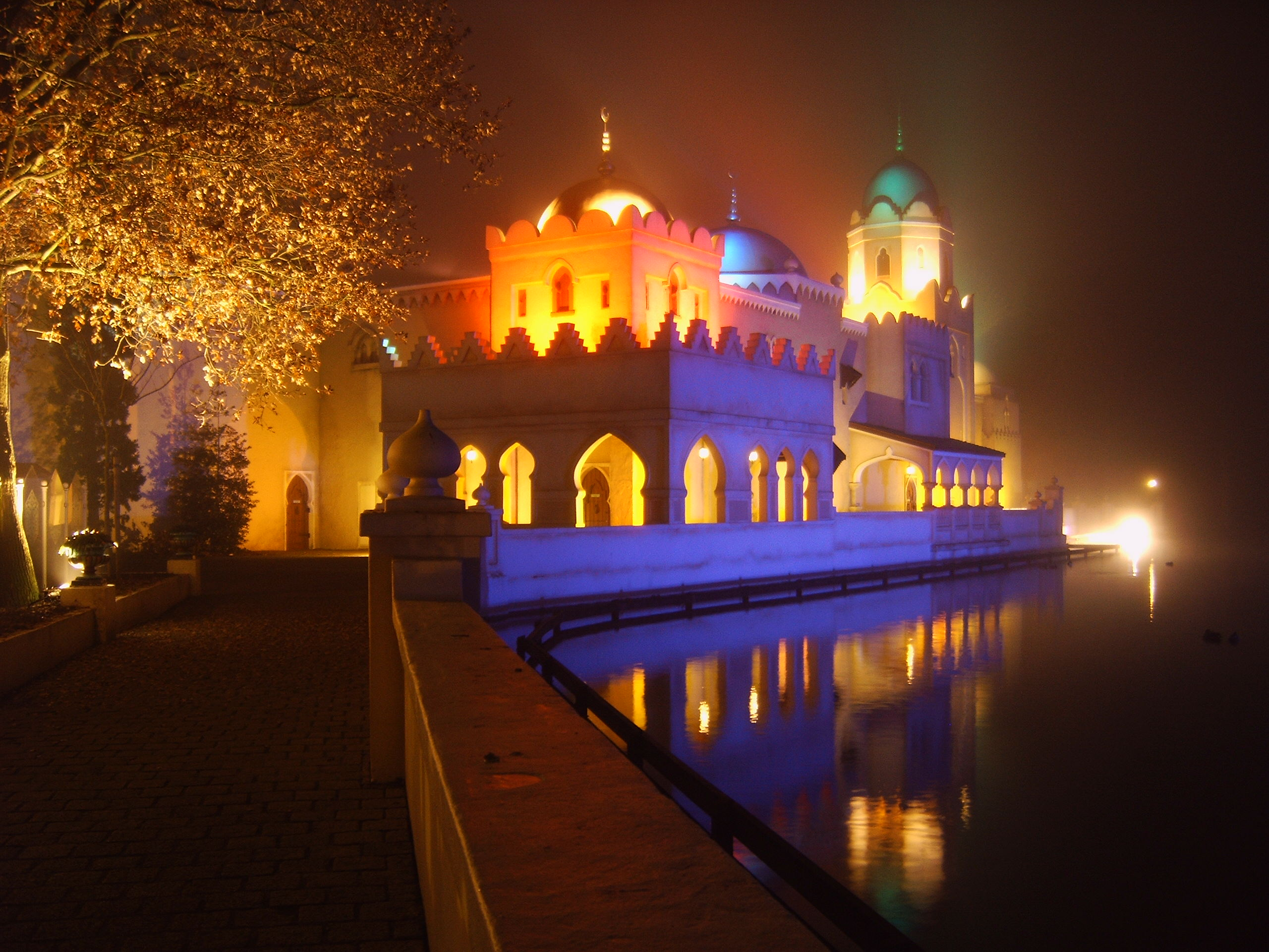 winter-efteling2